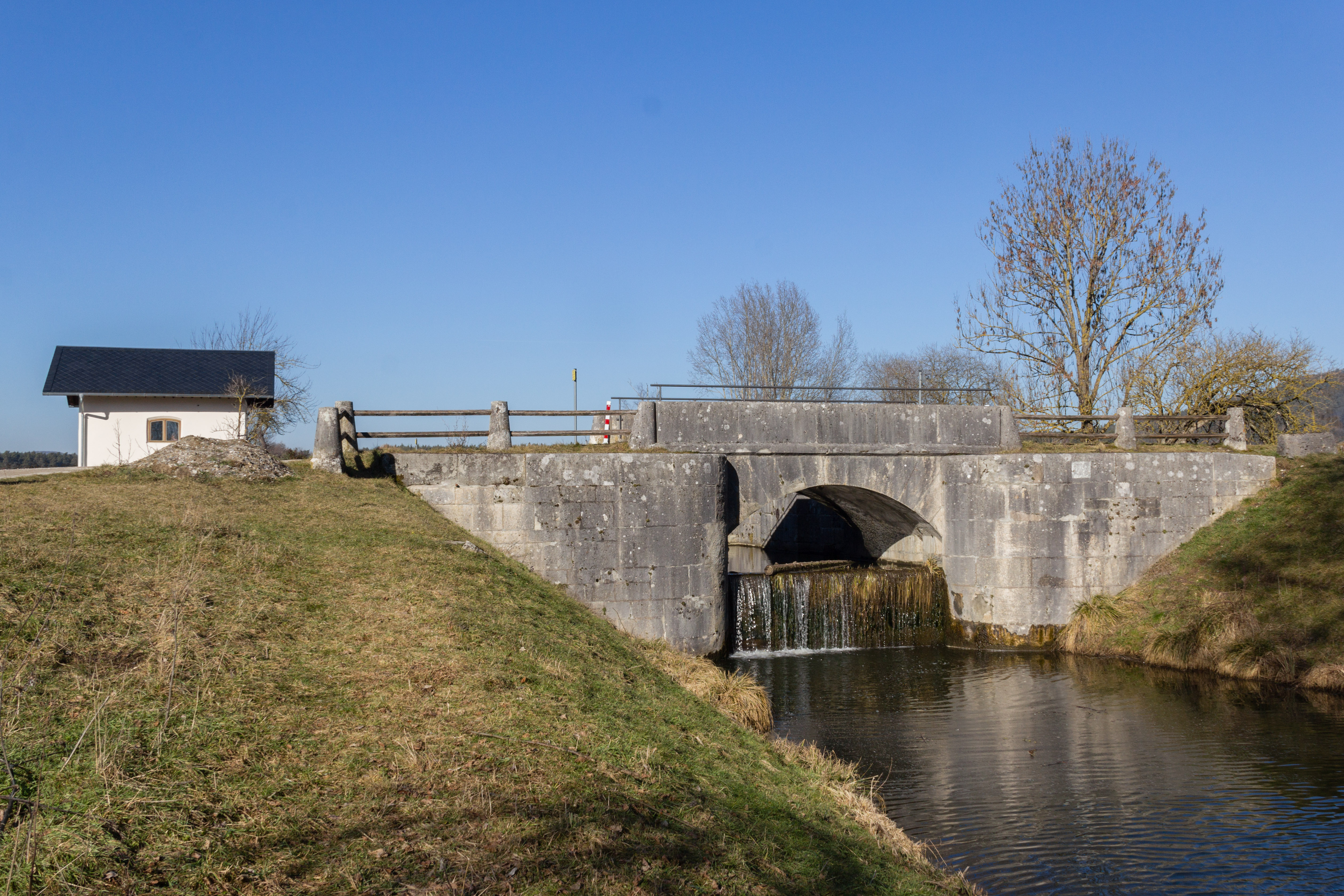 Ludwig-Donau-Main-Kanal, Mühlhausen, Schleuse 28